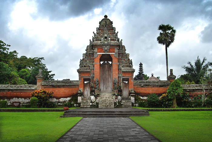 taman ayun, bali indonesia